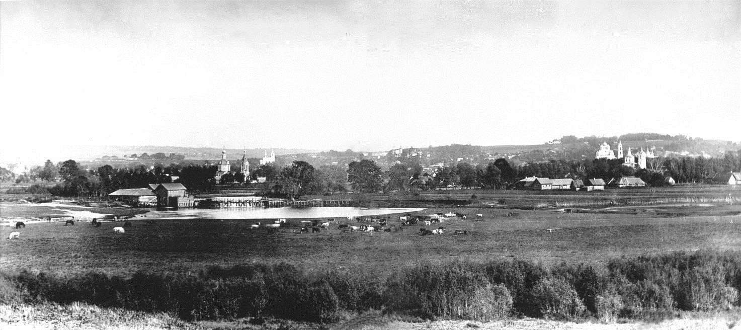 Фото Дмитрова с северо-запада. 1898 год